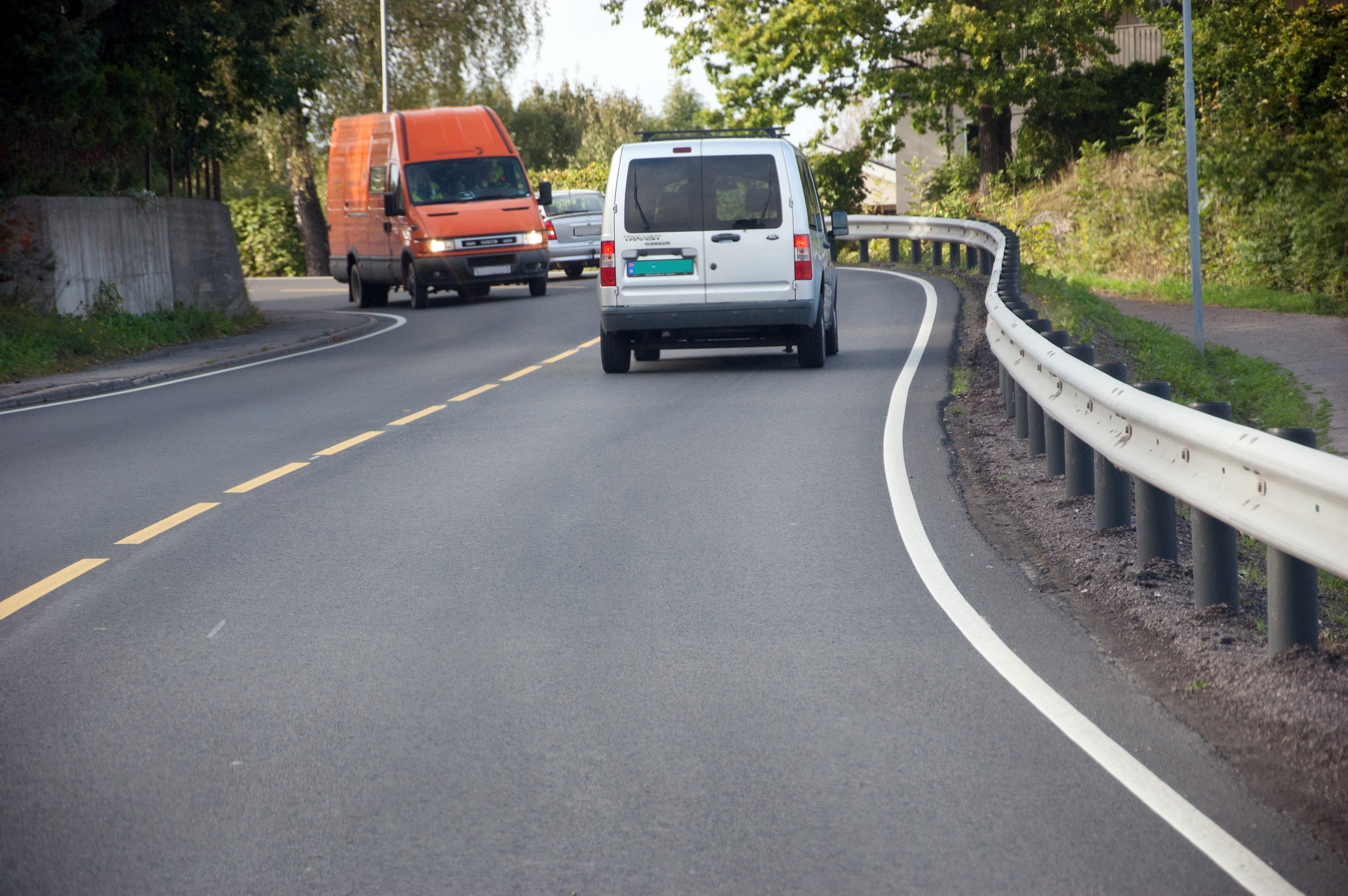 Fylkesvei 315 Hvittingfossveien i Holmestrand.